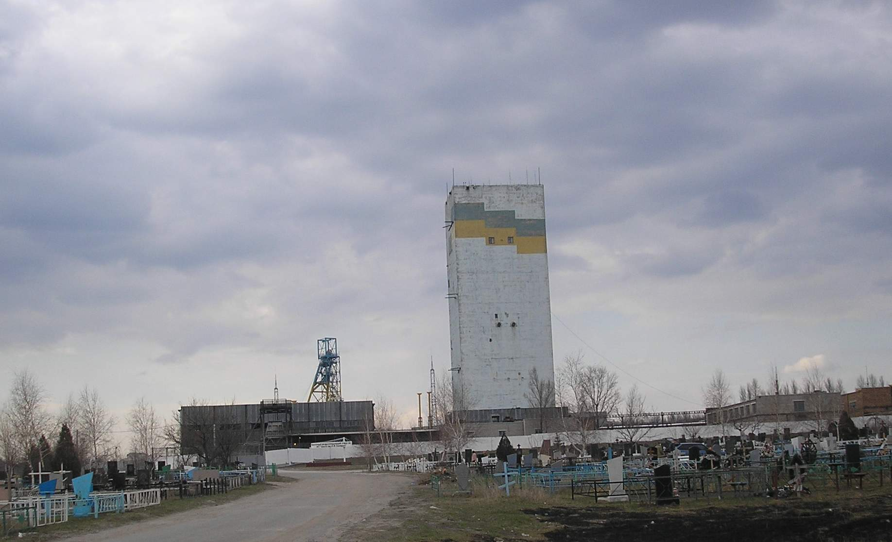 Ствол шахти ім. Засядько (м. Донецьк), який знаходиться поруч із Щегловським кладовищем.